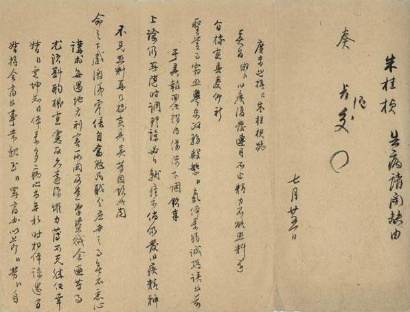 朱桂楨奏聞微臣告病請開缺摺